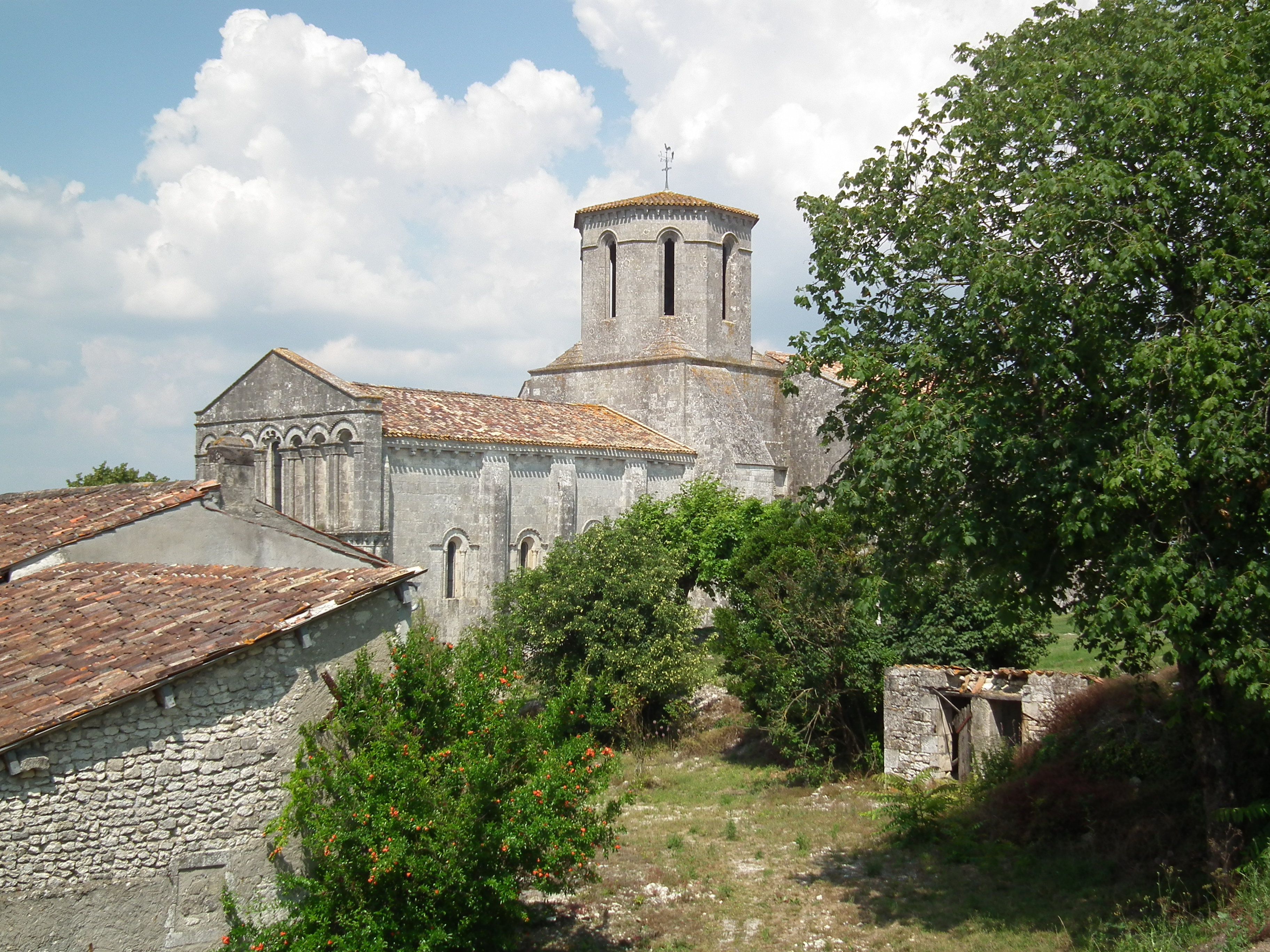 Le village d'Echebrune